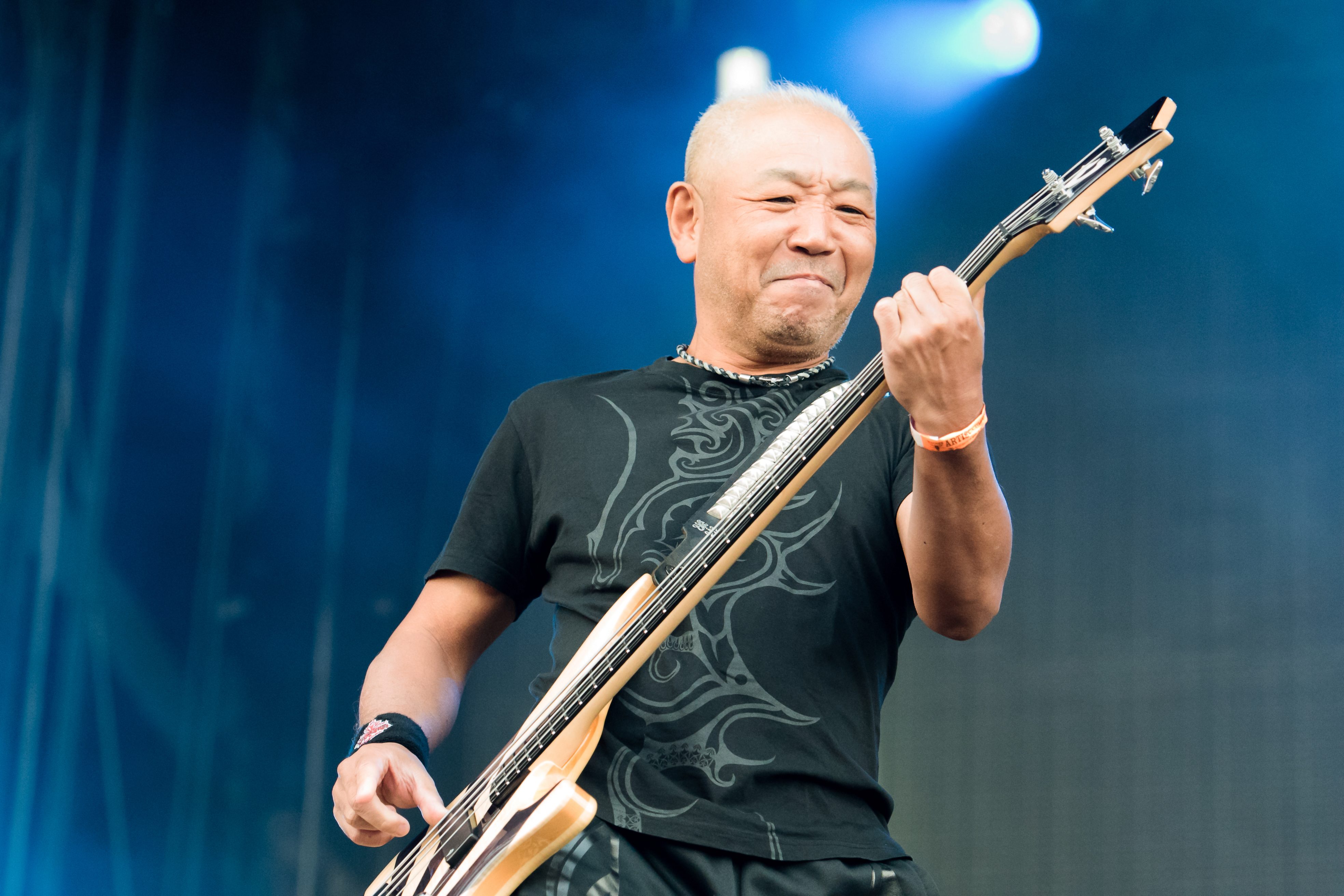 Loudness beim Wacken Open Air 2016